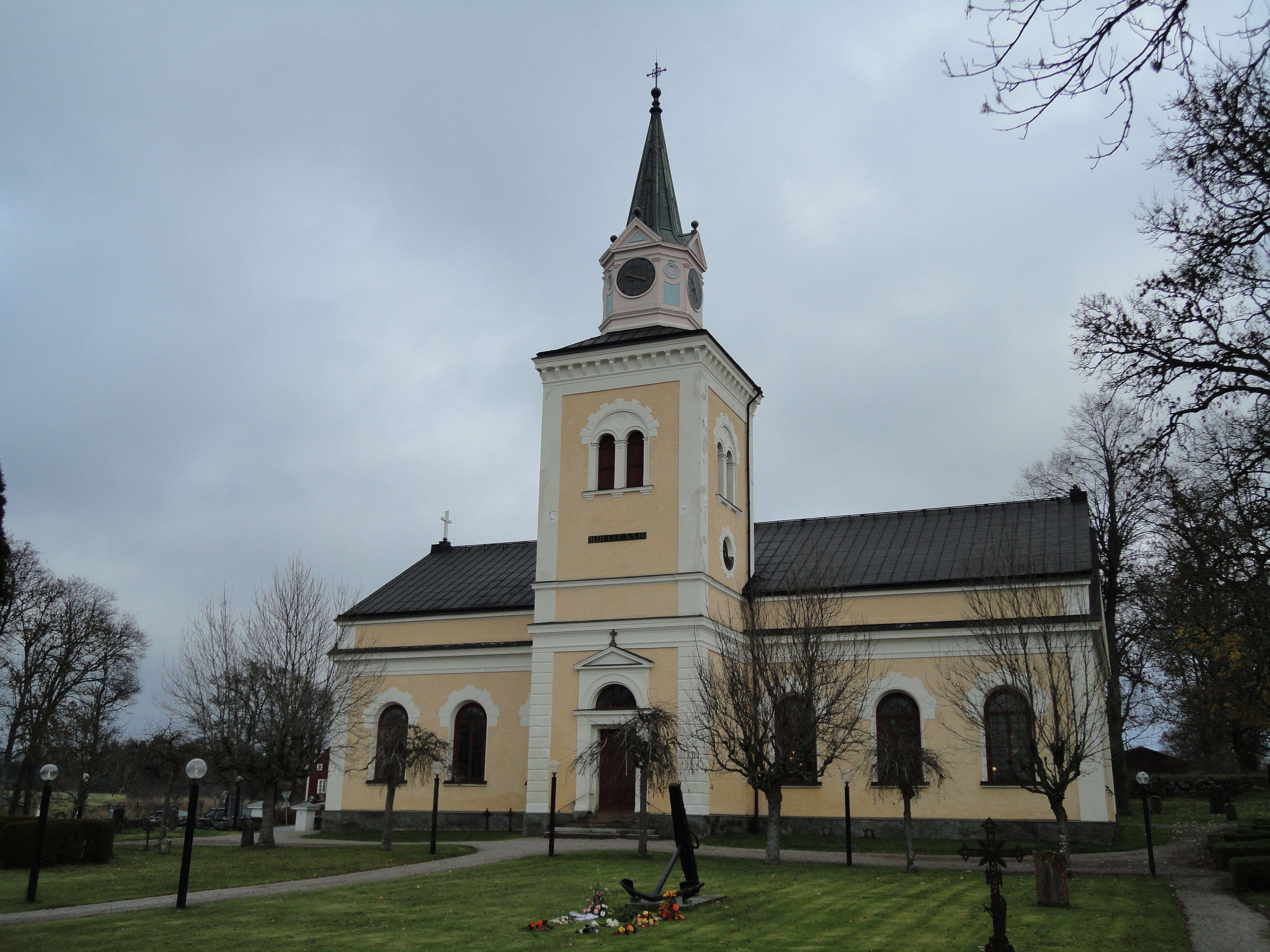 Väddö kyrka, Norrtälje kommun.